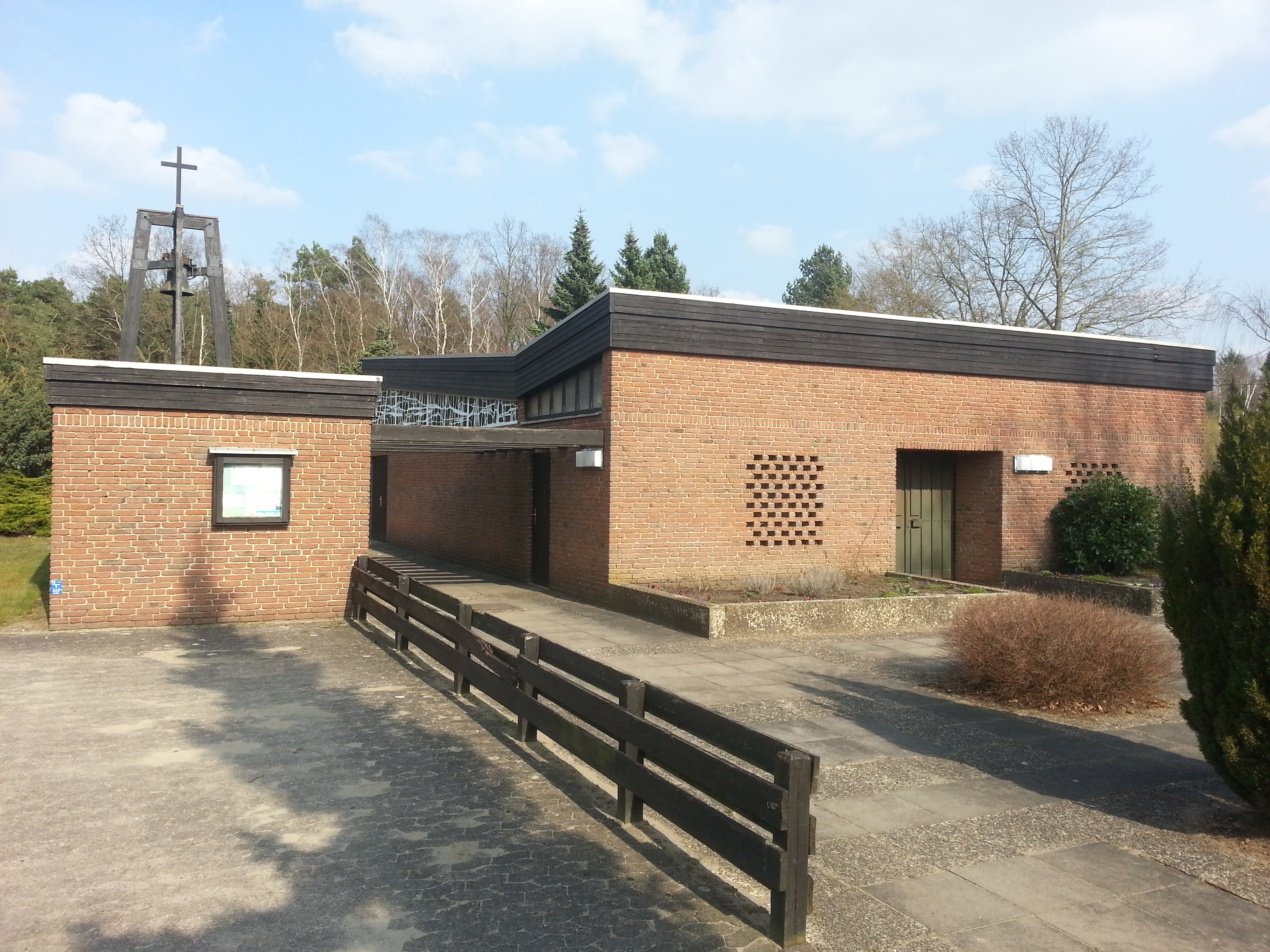 Kirche